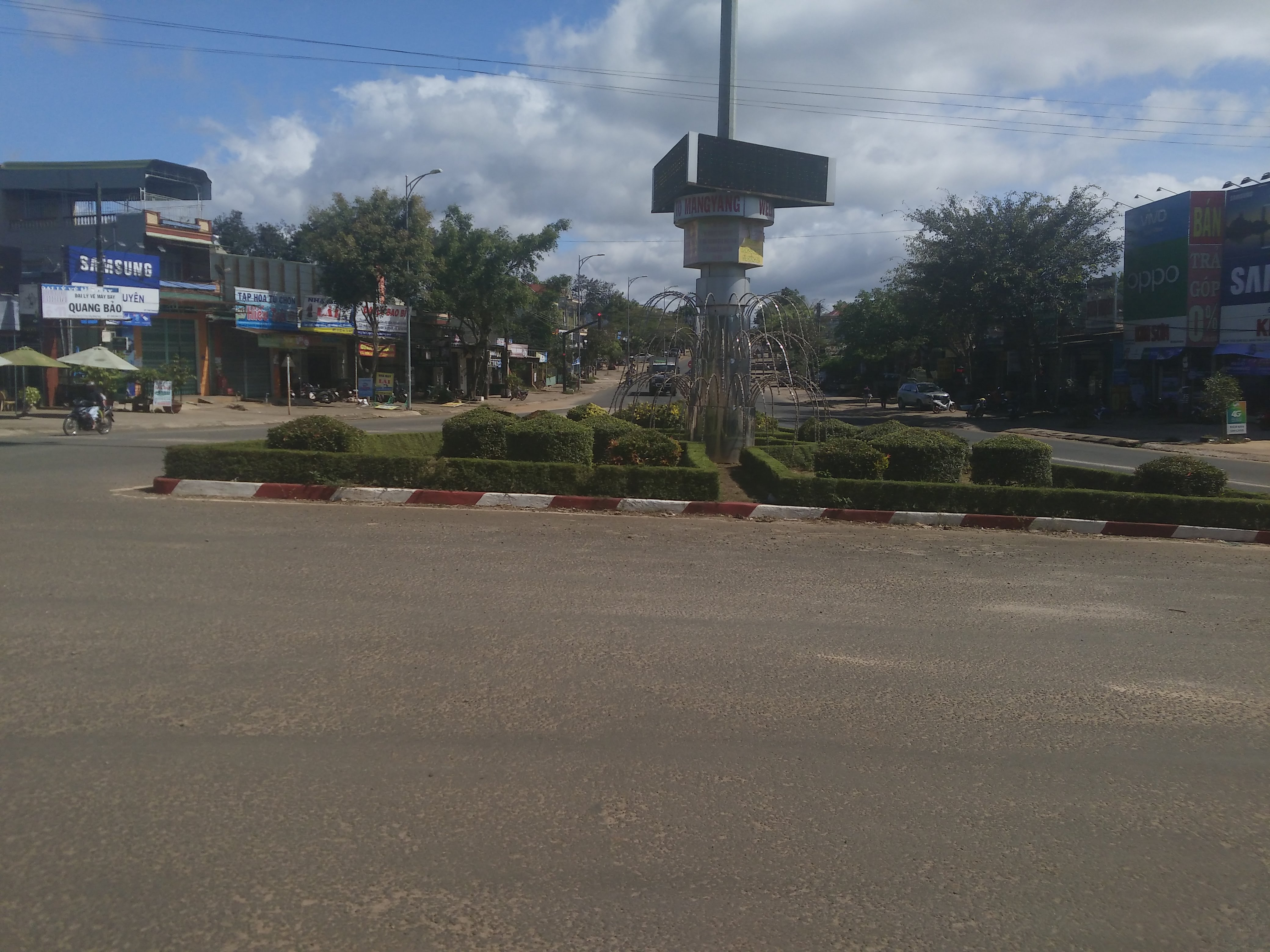 Ngã ba thị trấn Kon Dơng, huyện Mang Yang - Gia Lai ( 2017 ).